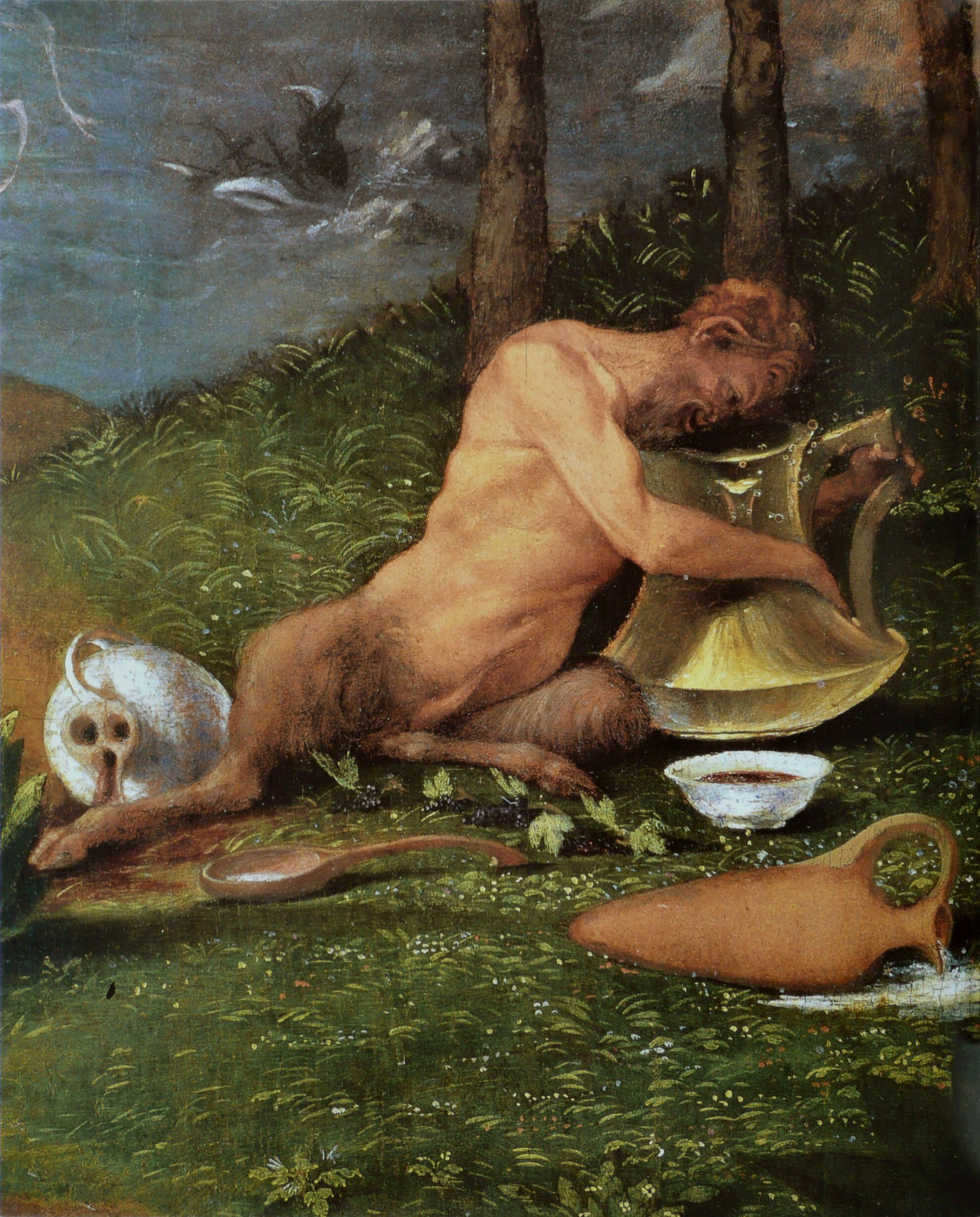 detail